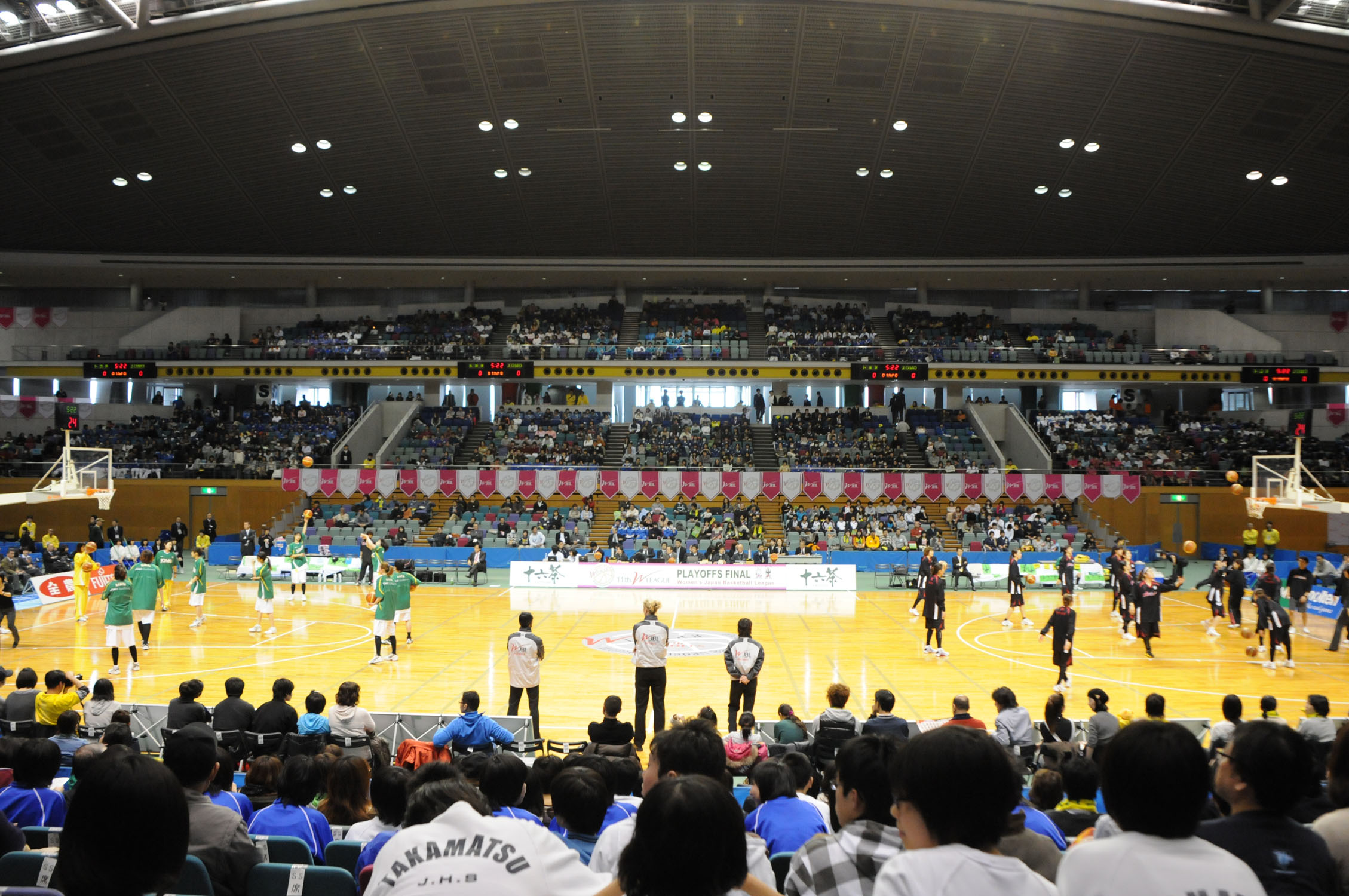 ぐんまアリーナ、内部。